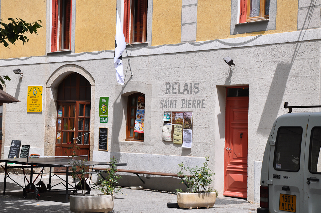 Hôtel-restaurant au Fugeret